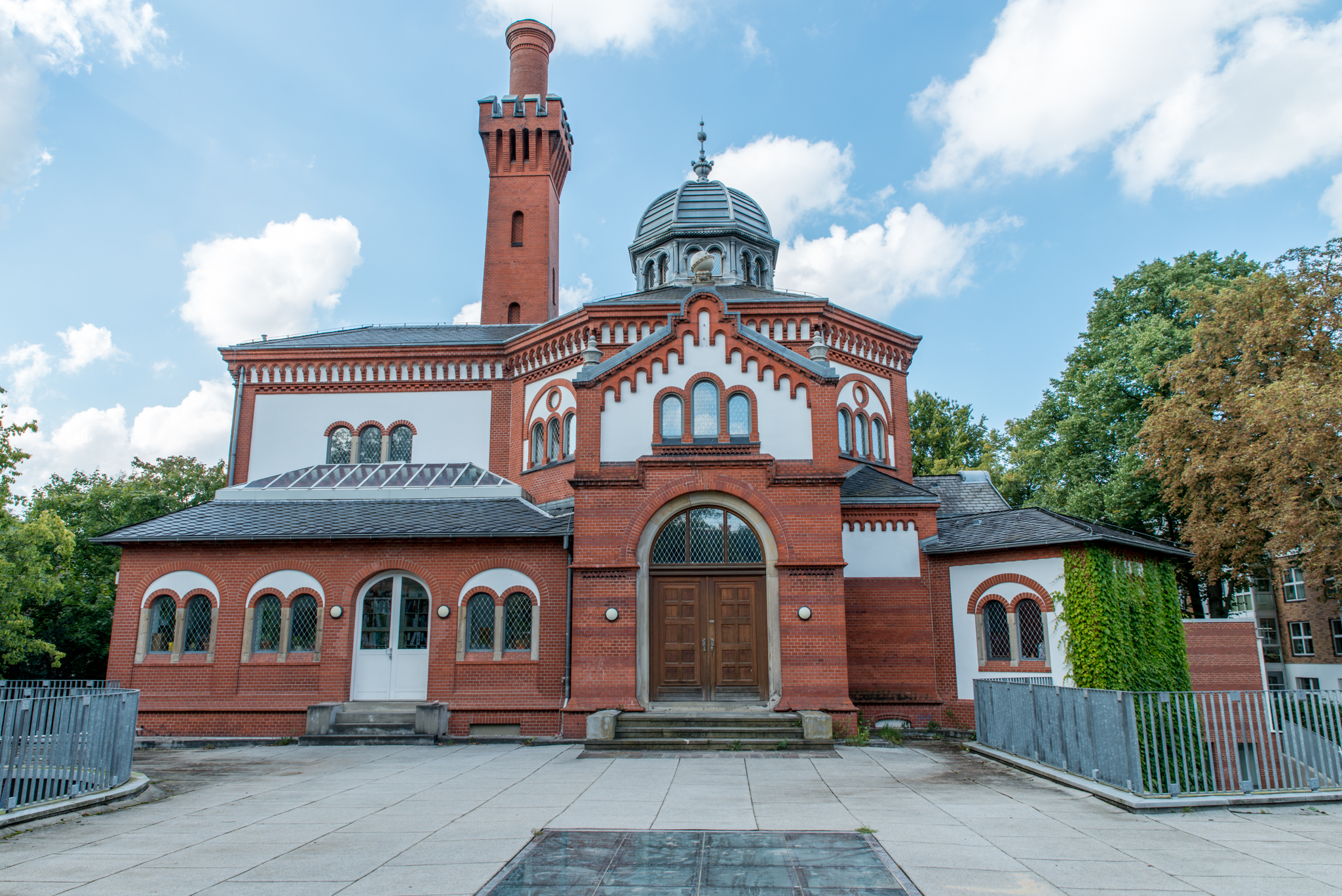 Altes KrematoriumThis is a photograph of an architectural monument.